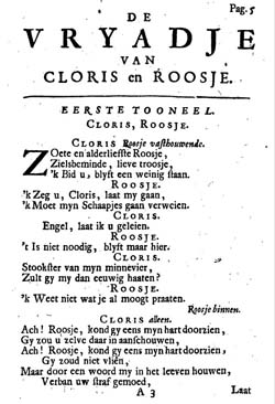 Tekstboek van het toneelstuk van Dirk Buysero